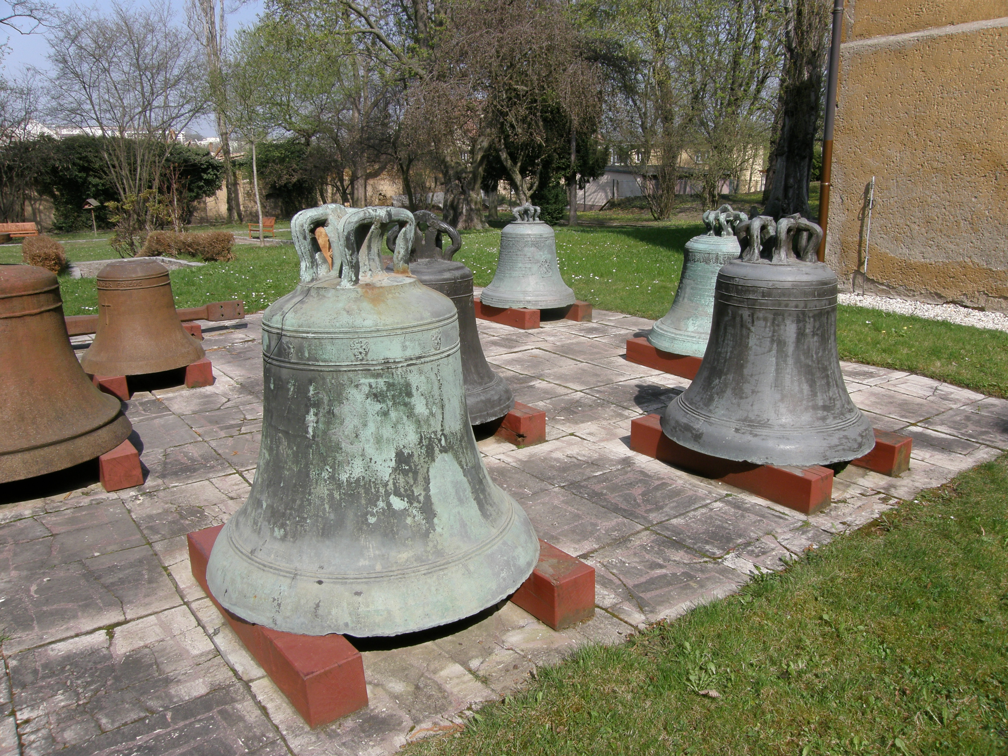 Stadt Apolda - Glocken im Hof des Glockenmuseums